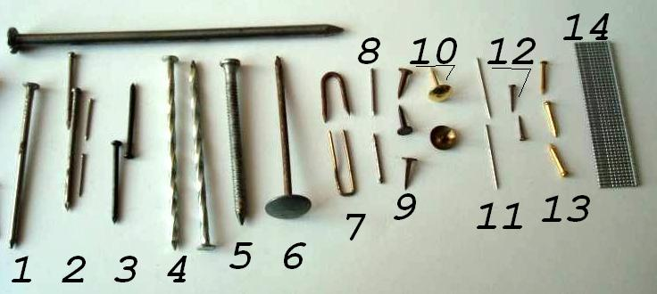 Photo de divers clous d'aujourd'hui